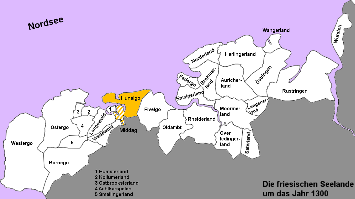 Karte der freien friesischen Seelande (Landesgemeinden) von der Zuiderzee bis zur Weser in den Grenzen um das Jahr 1300; der Hunsigo ist hervorgehoben, das später zum Westerkwartier gewechselte Viertel Middag ist schraffiert. (Karte ohne Inseln.)